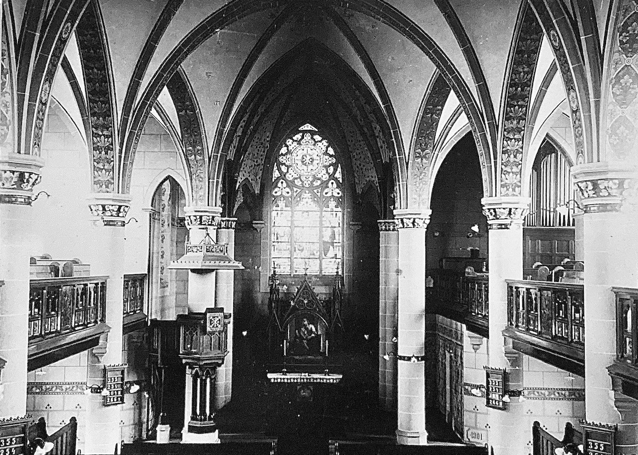 Innenansicht der neu erbauten Christuskirche um 1905